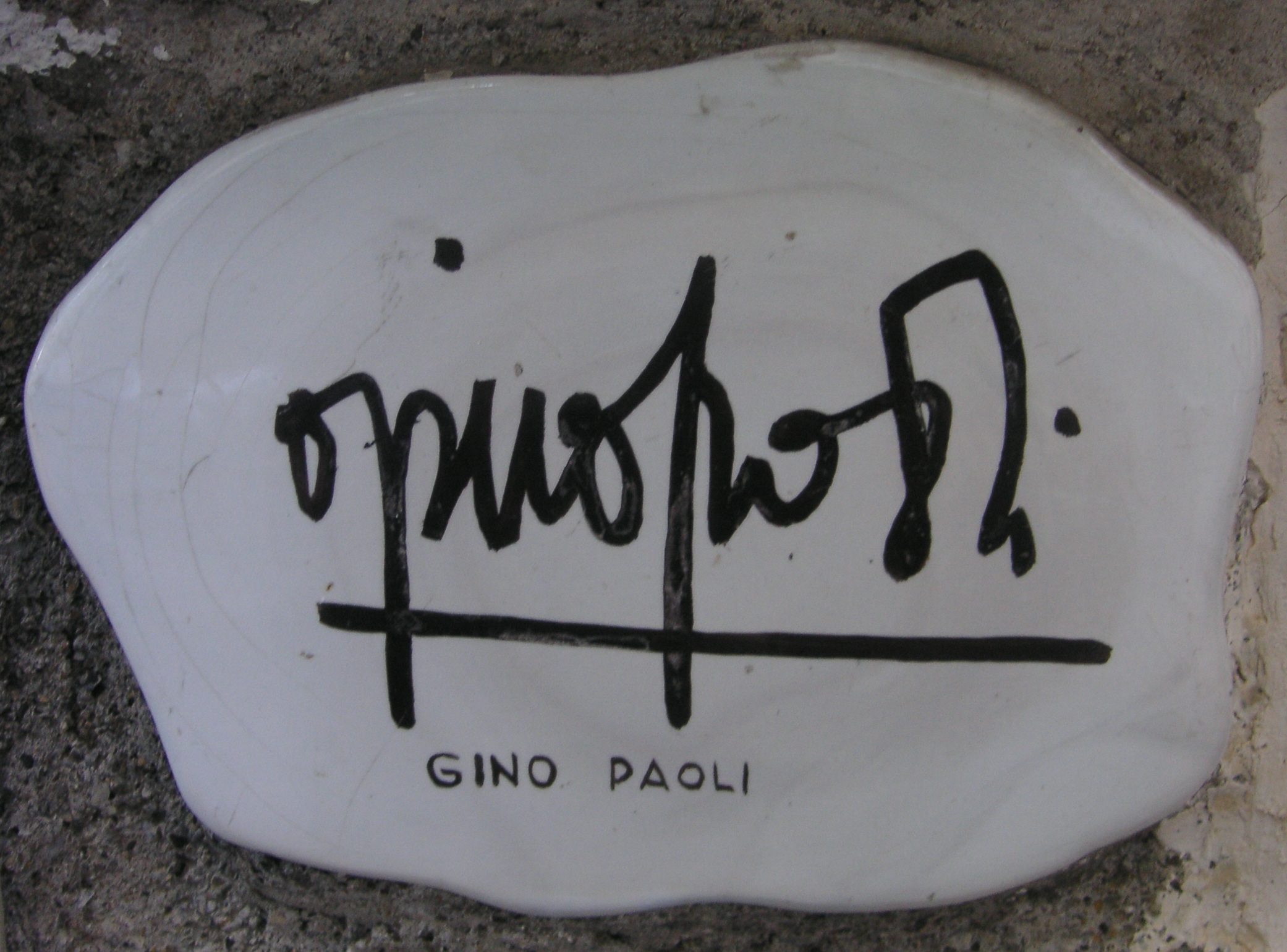 Piastrella autografata da Gino Paoli sul muretto di Alassio.